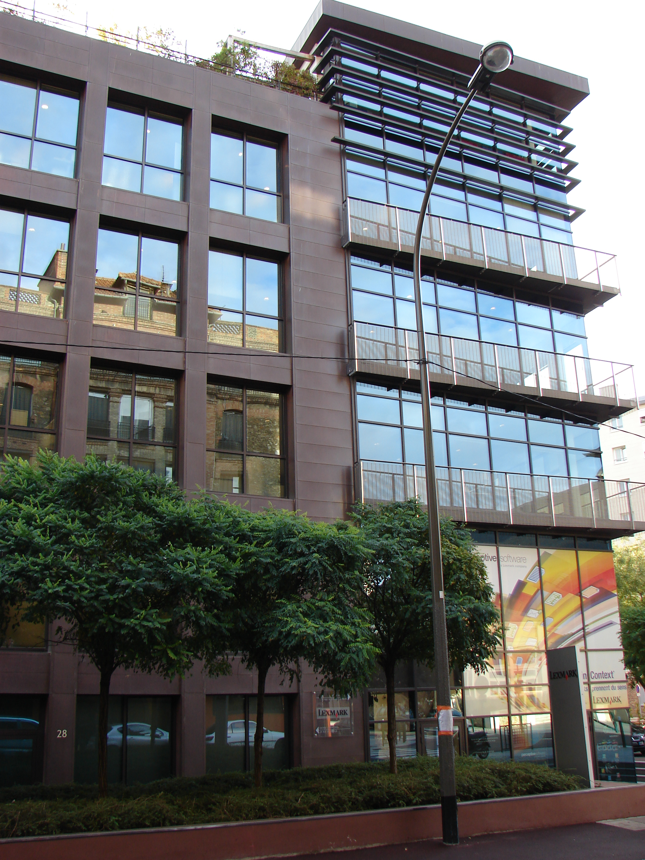 Gendarmerie située au 28 rue de Verdun à Suresnes